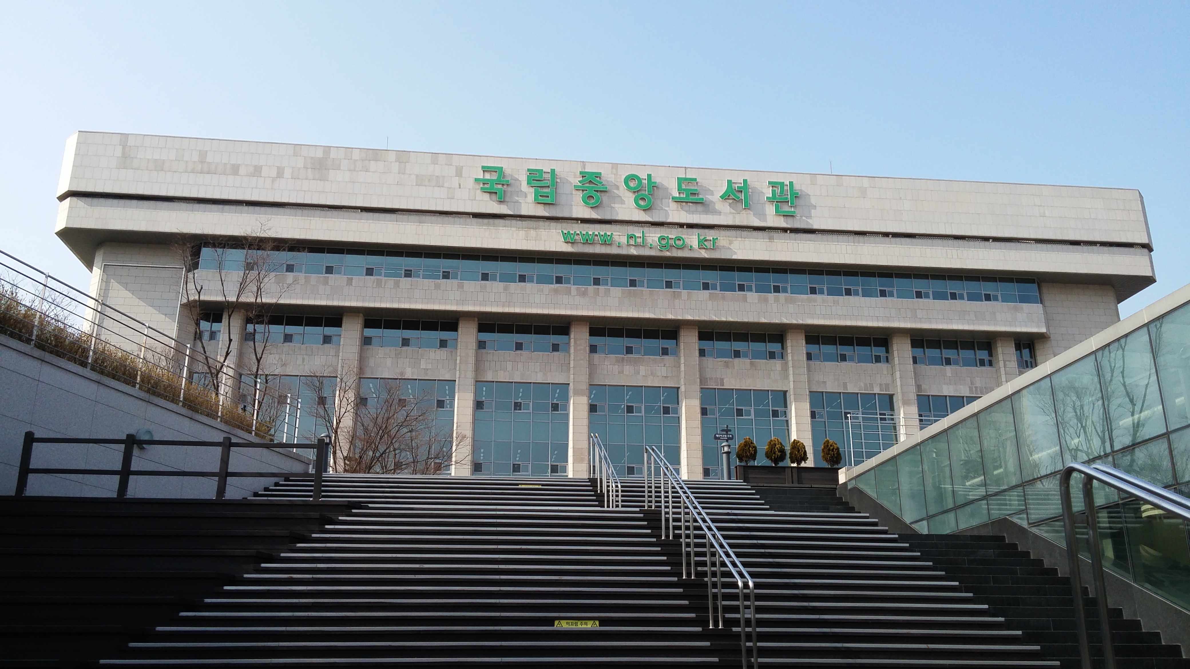 Koreanische Nationalbibliothek